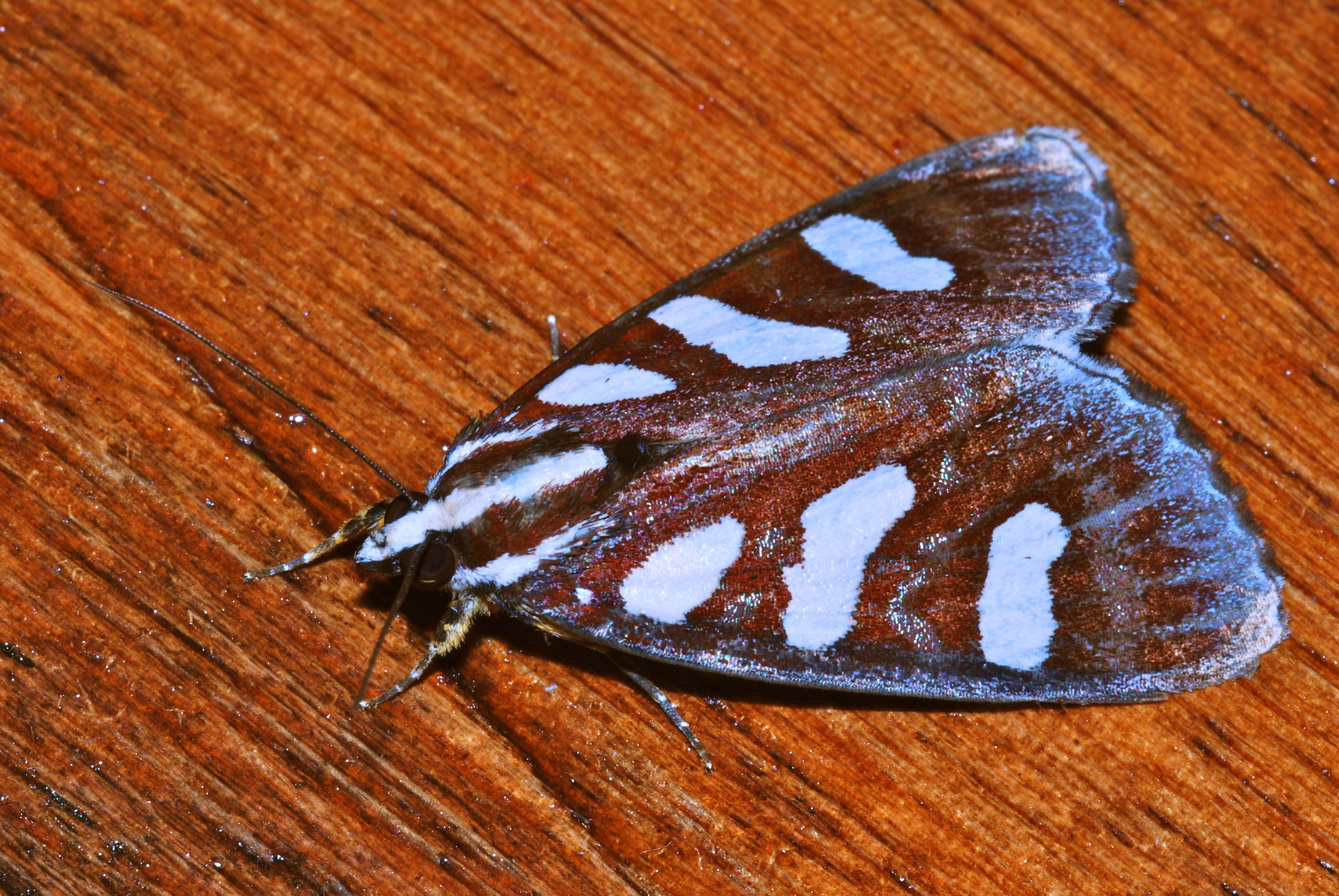 Bilit, Sabah, MALAYSIA